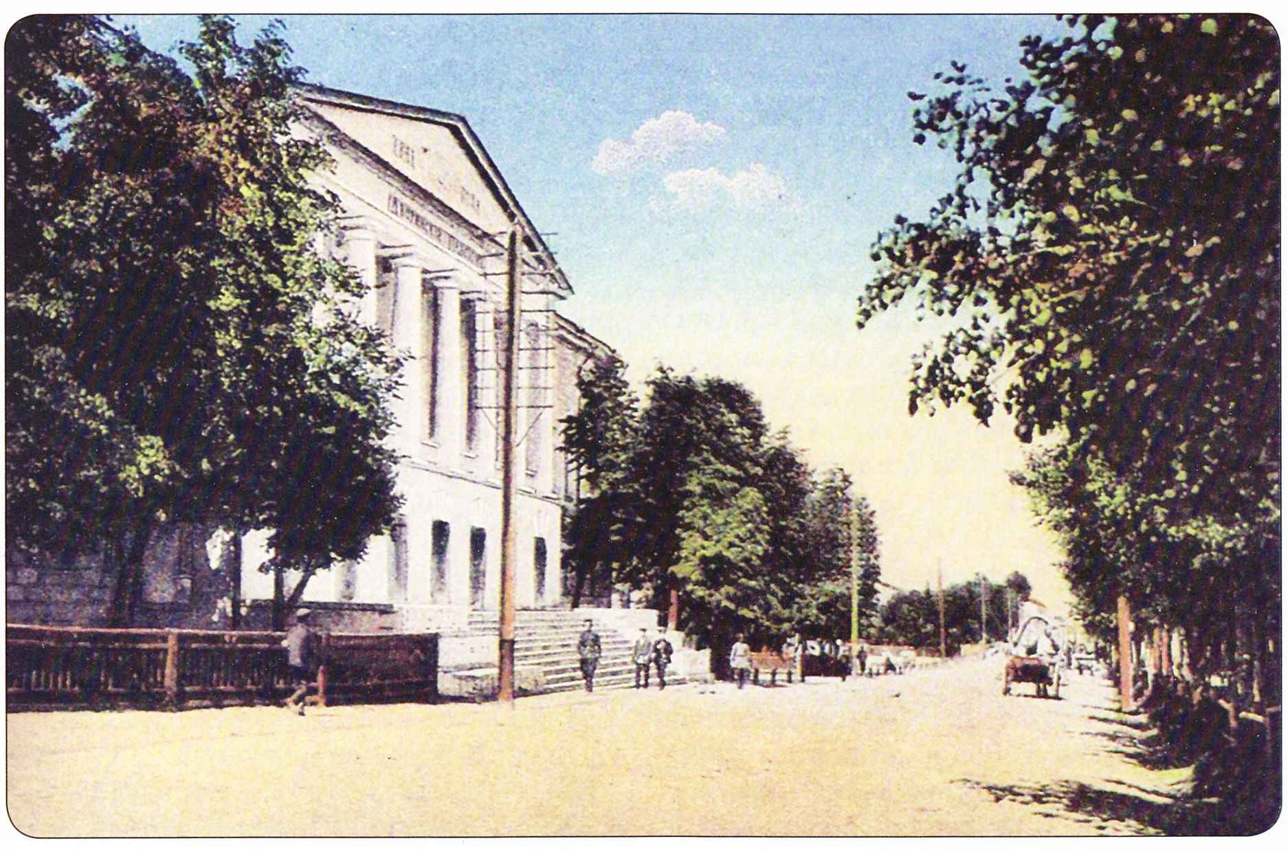 Владимирская мужская гимназия. Открытка начала XX века.